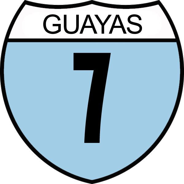 Disco de Identificación Ruta Provincial Guayas 7